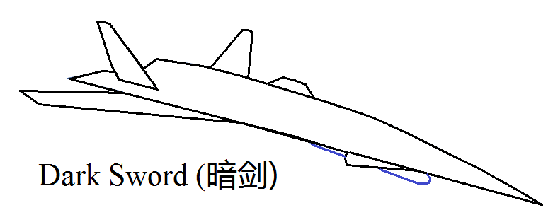 Беспилотный гиперзвуковой военный летательный аппарат КНР "Тёмный меч"